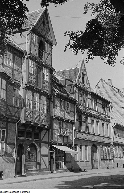 Original image description from the Deutsche FotothekAußenansicht der "Börse" am Steinweg 23